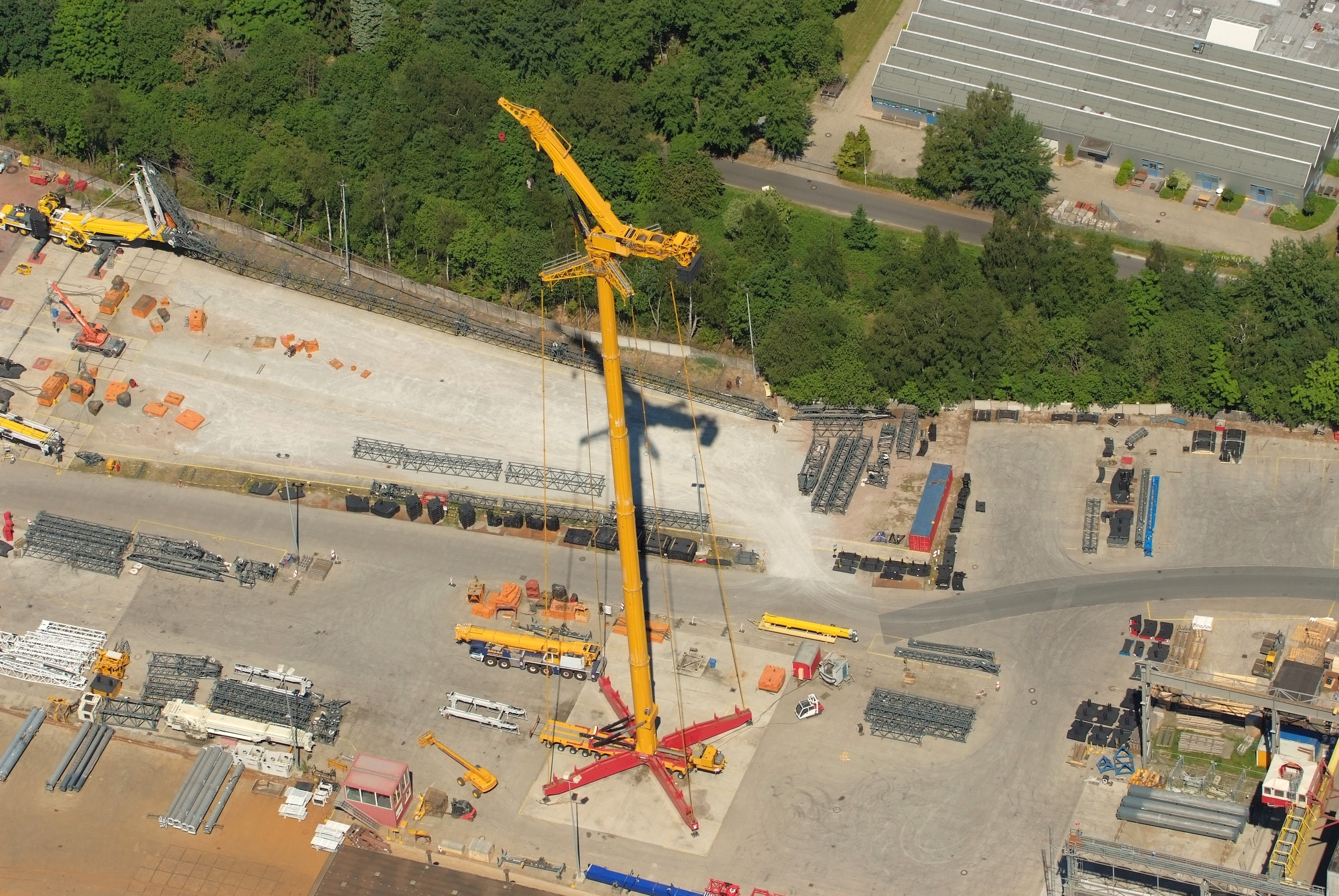 Fotoflug vom Flugplatz Nordholz-Spieka über Cuxhaven und Wilhelmshaven